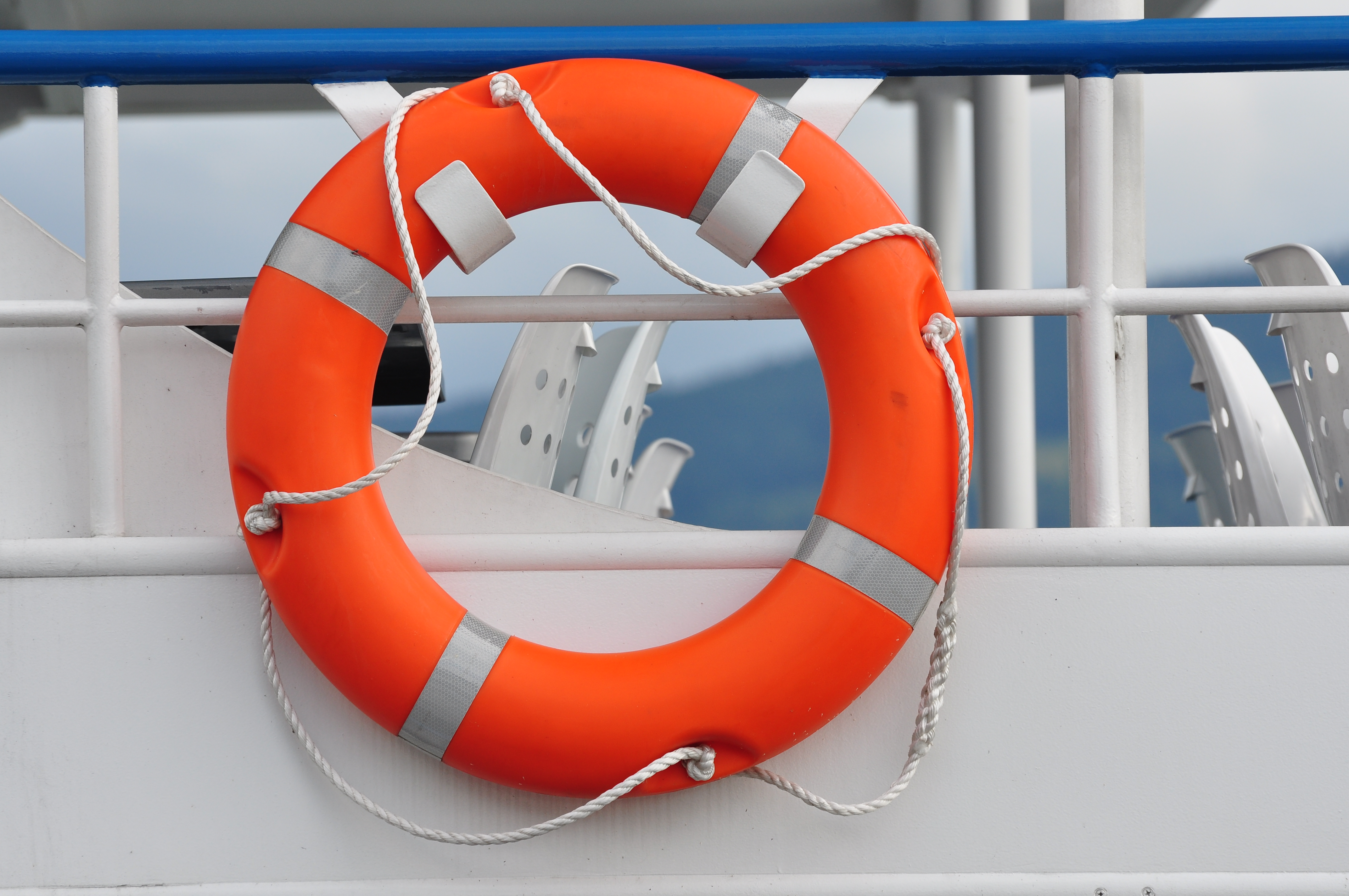 Zürichsee-Schifffahrtsgesellschaft (ZSG) MS Linth on Zürichsee in Rapperswil (Switzerland)